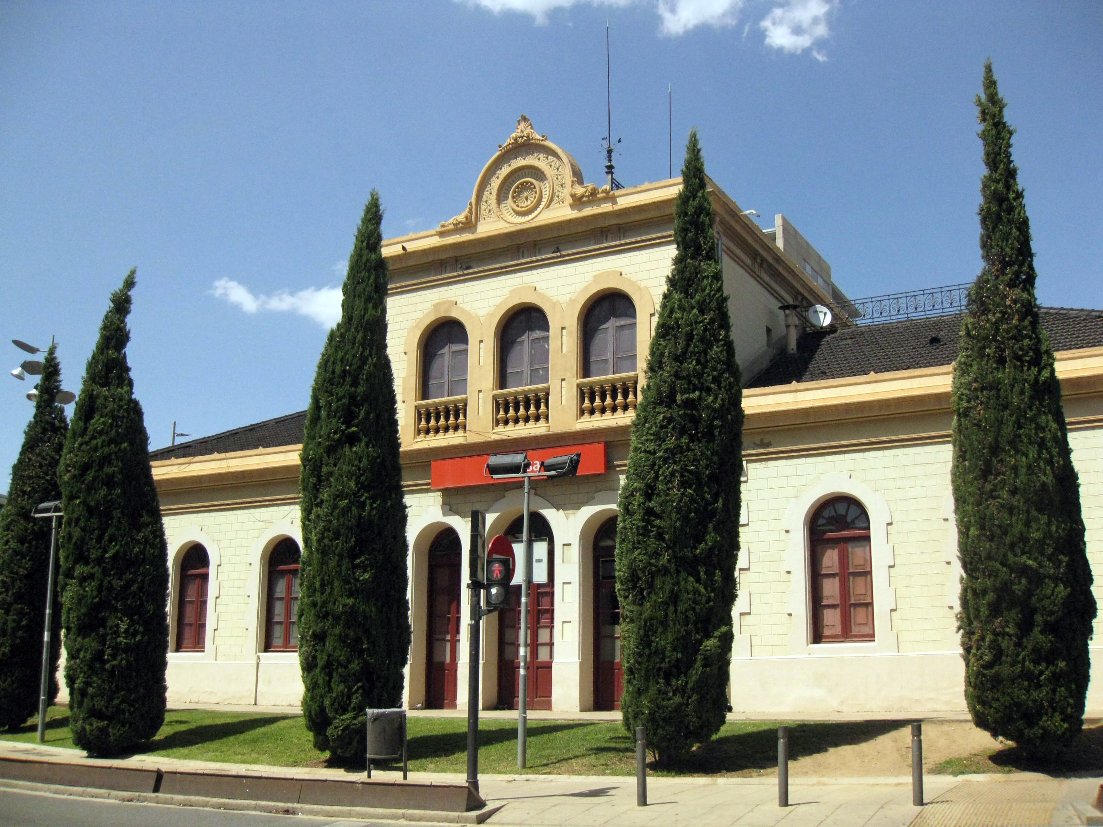 Estació del Nord (Terrassa, Vallès Occidental), façana sud.